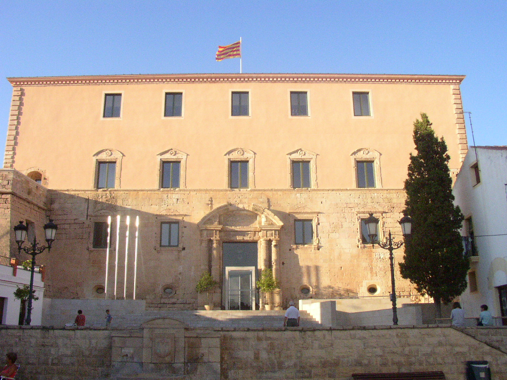 Castell de Torredembarra on actualment hi tenen la seu de l'ajuntament.